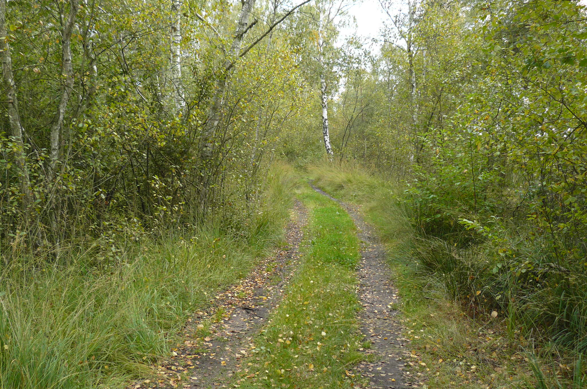 Droga na terenie Bagna Chlebowo.